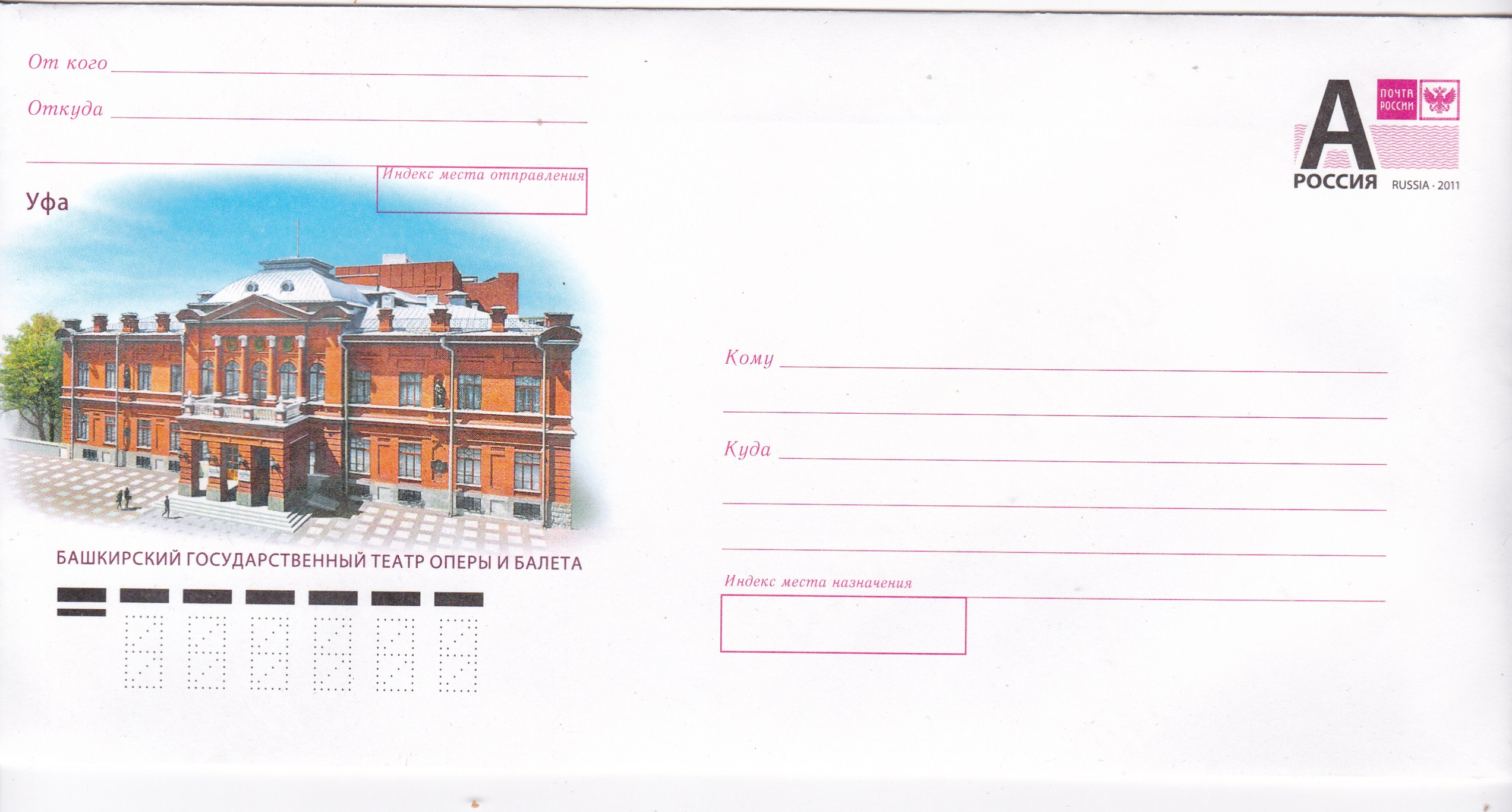 Башкирский государственный театр оперы и балета, почтовый конверт РОССИЯ